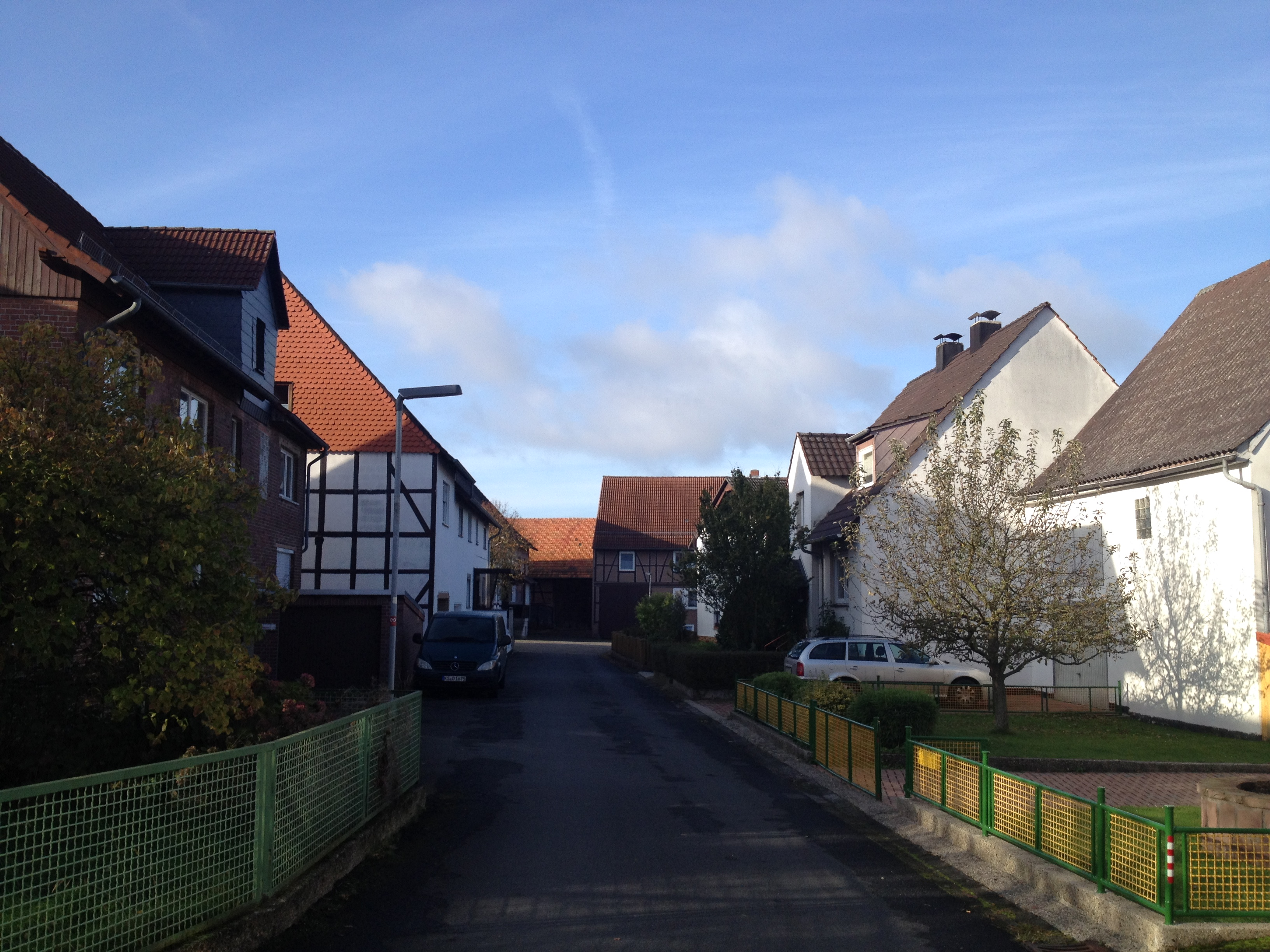 Der Eco Pfad Kulturgeschichte Dörnberg in der Quergasse in Dörnberg, einem Ortsteil von Habichtswald